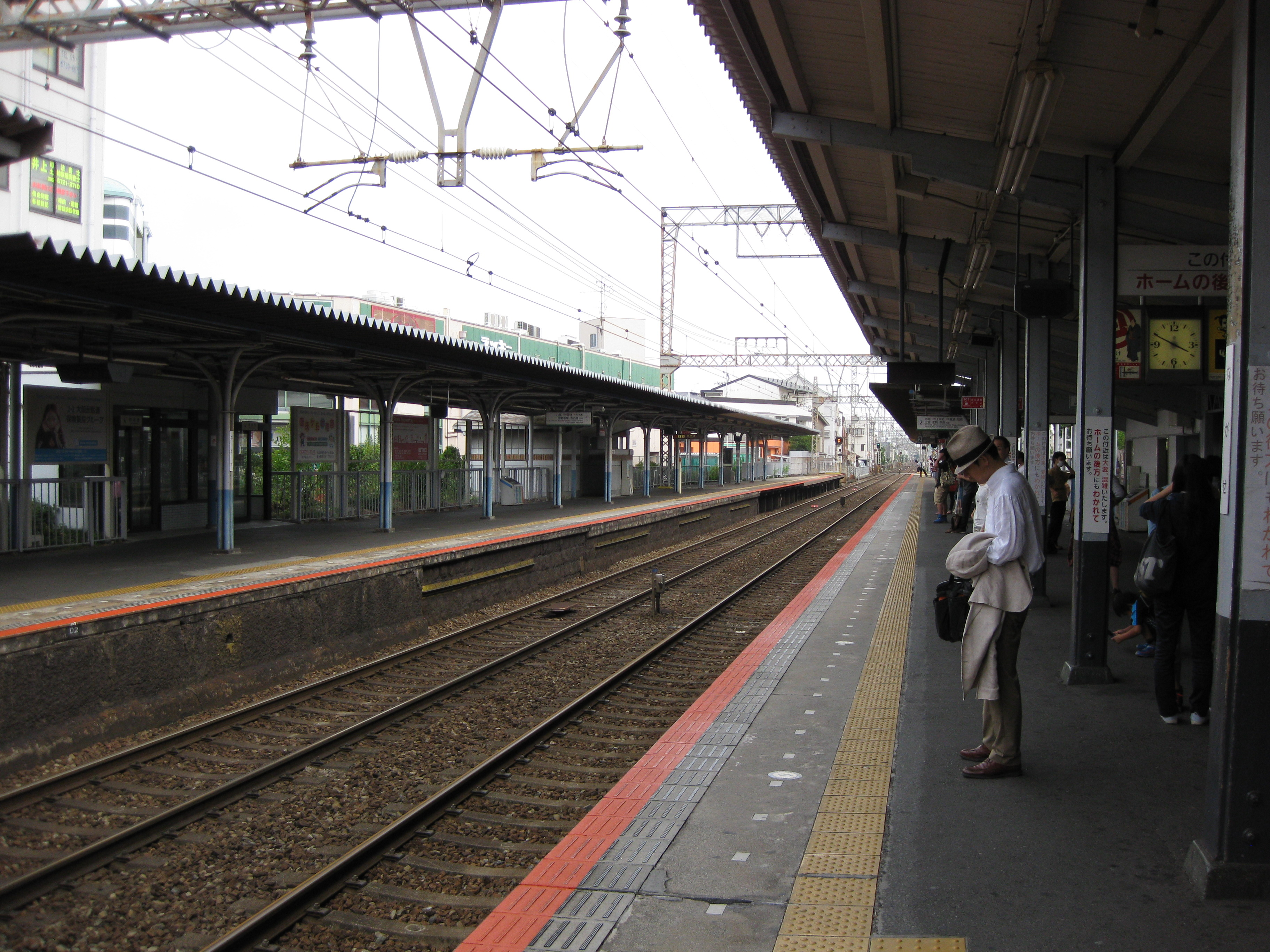 長瀬駅プラットホーム